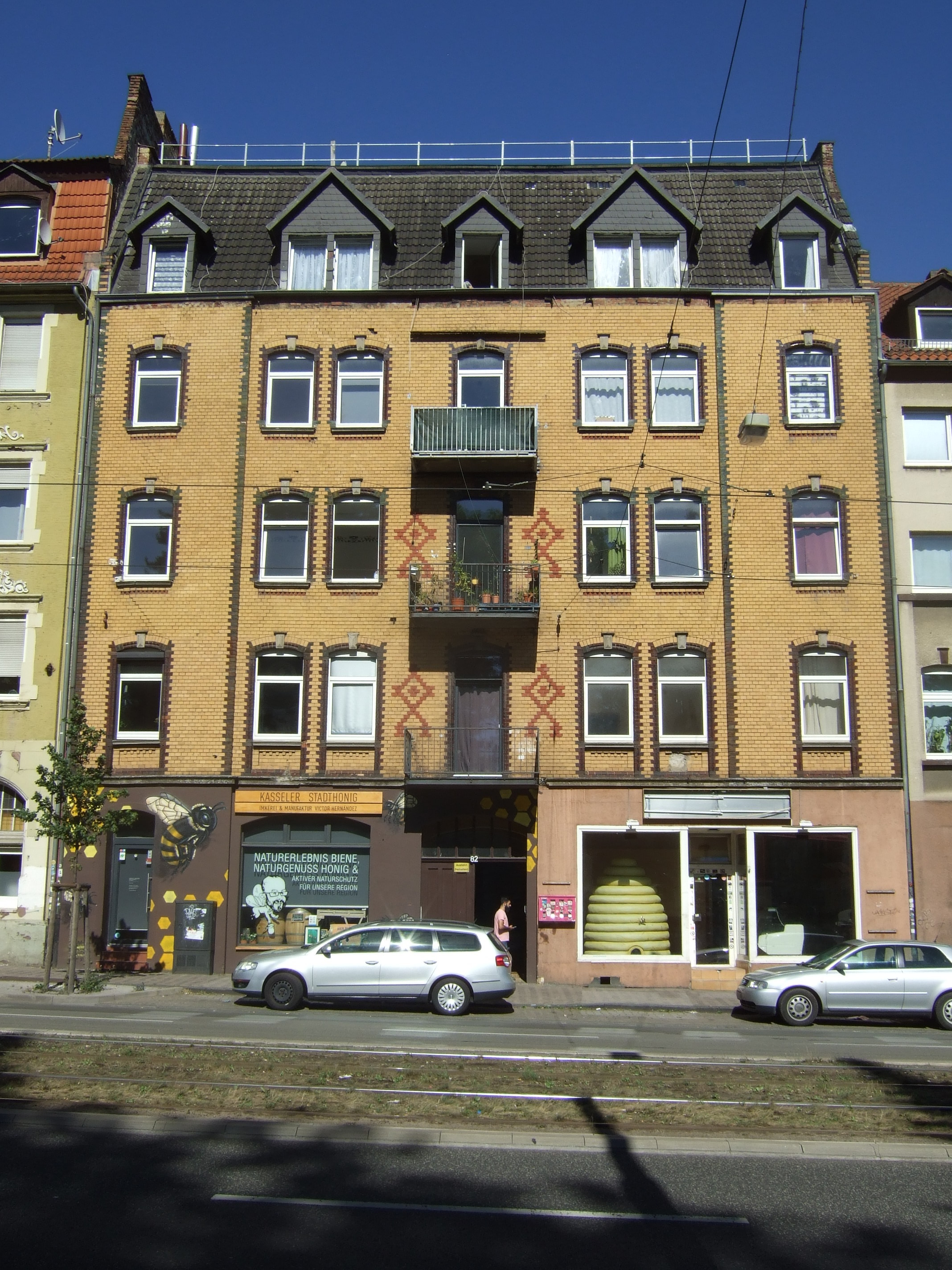 Kassel Holländische Str. 82 Standort des Internetcafes von Halit Yozgat und Tatort